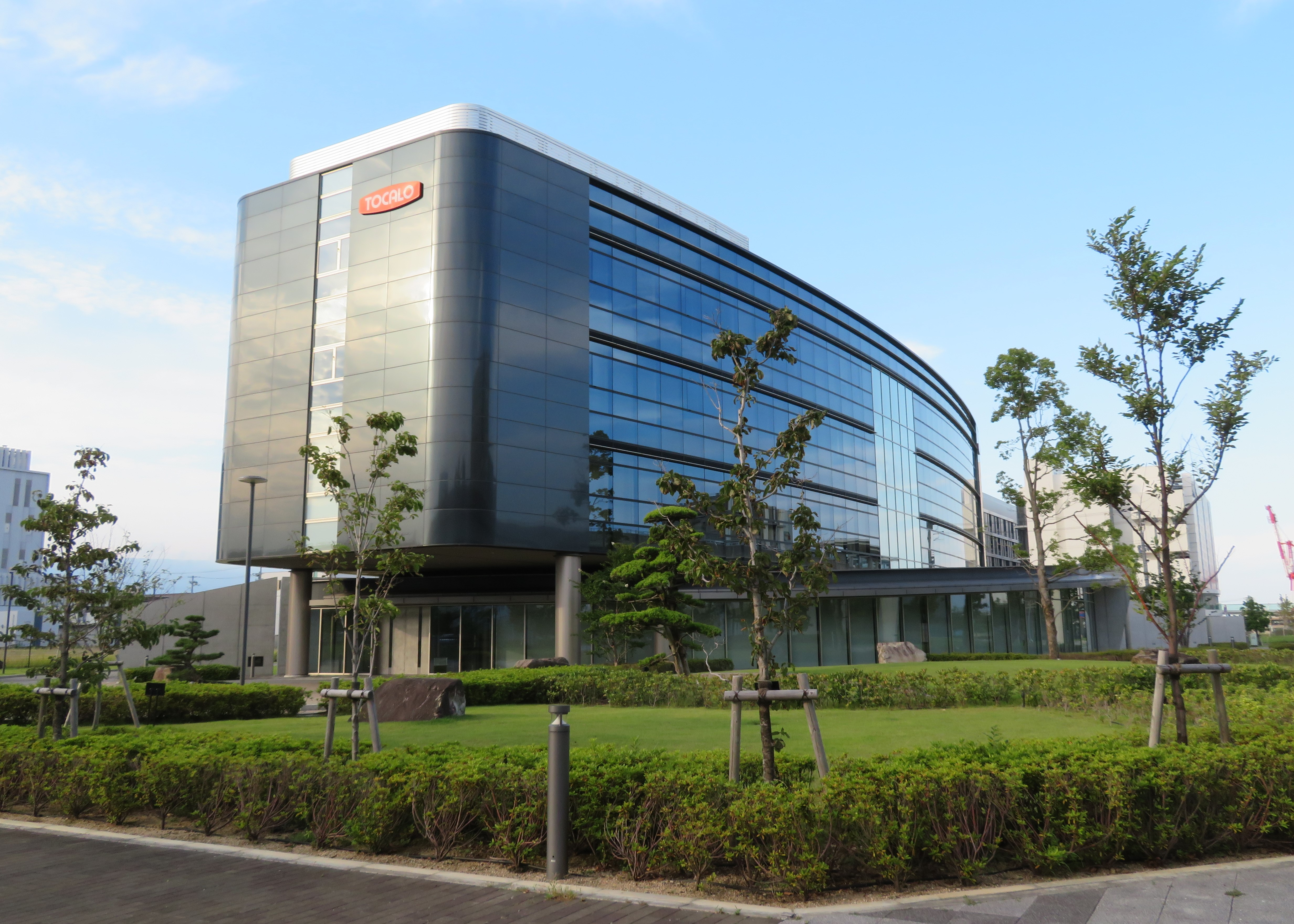 トーカロ本社